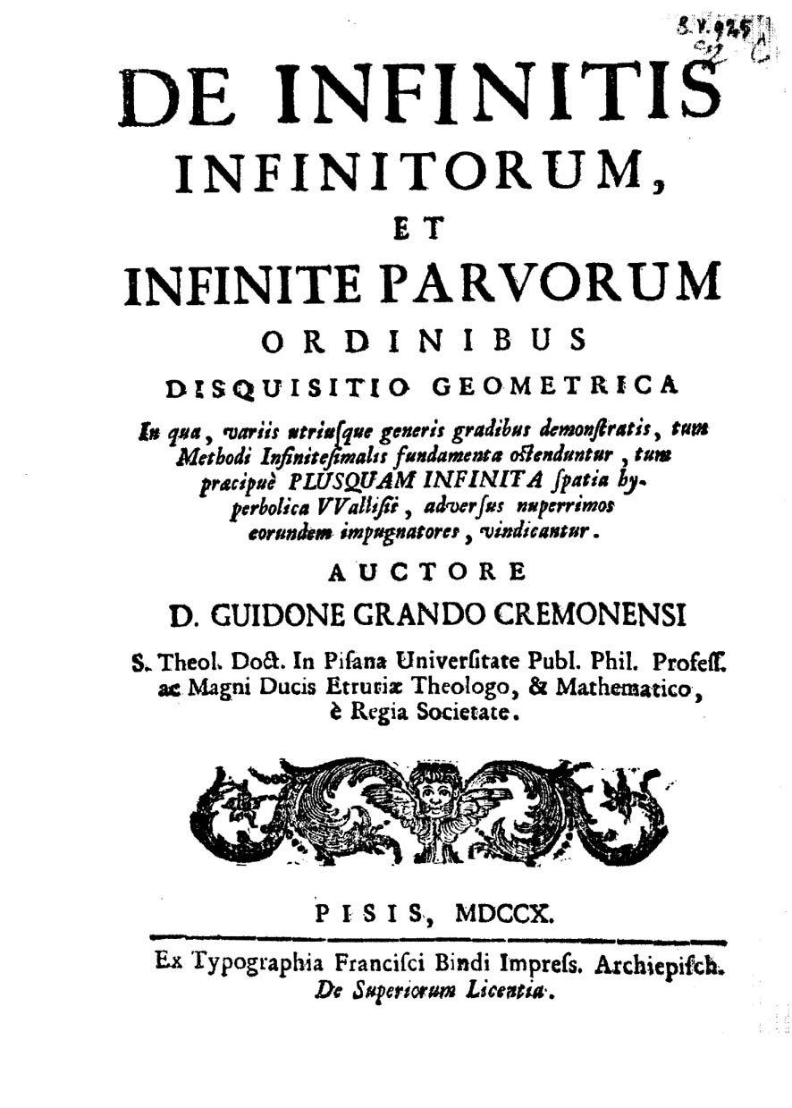 De infinitis infinitorum, et infinite parvorum ordinibus disquisitio geometrica in qua, variis utriusque generis gradibus demonstratis, tum methodi infinitesimalis fundamenta ostenduntur, tum praecipue plusquam infinita spatia hyperbolica VVallisii, adversus nuperrimos eorundem impugnatores, vindicantur. Auctore d. Guidone Grando .... - Pisis : ex Typographia Francisci Bindi impress. archiepisch., 1710. - [8], 100 p., [1] c. di tav. inc., ritr. : ill. ; 4º . Frontespizio